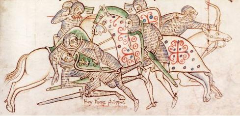 Die Schlacht bei Bouvines 1214. König Philipp II. August von Frankreich wird am Boden liegend von seinen Feinden bedrängt. Seine Ritter eilen herbei um ihn zu schützen. (Cambridge, Corpus Christi College, MS 16 fol. 37)